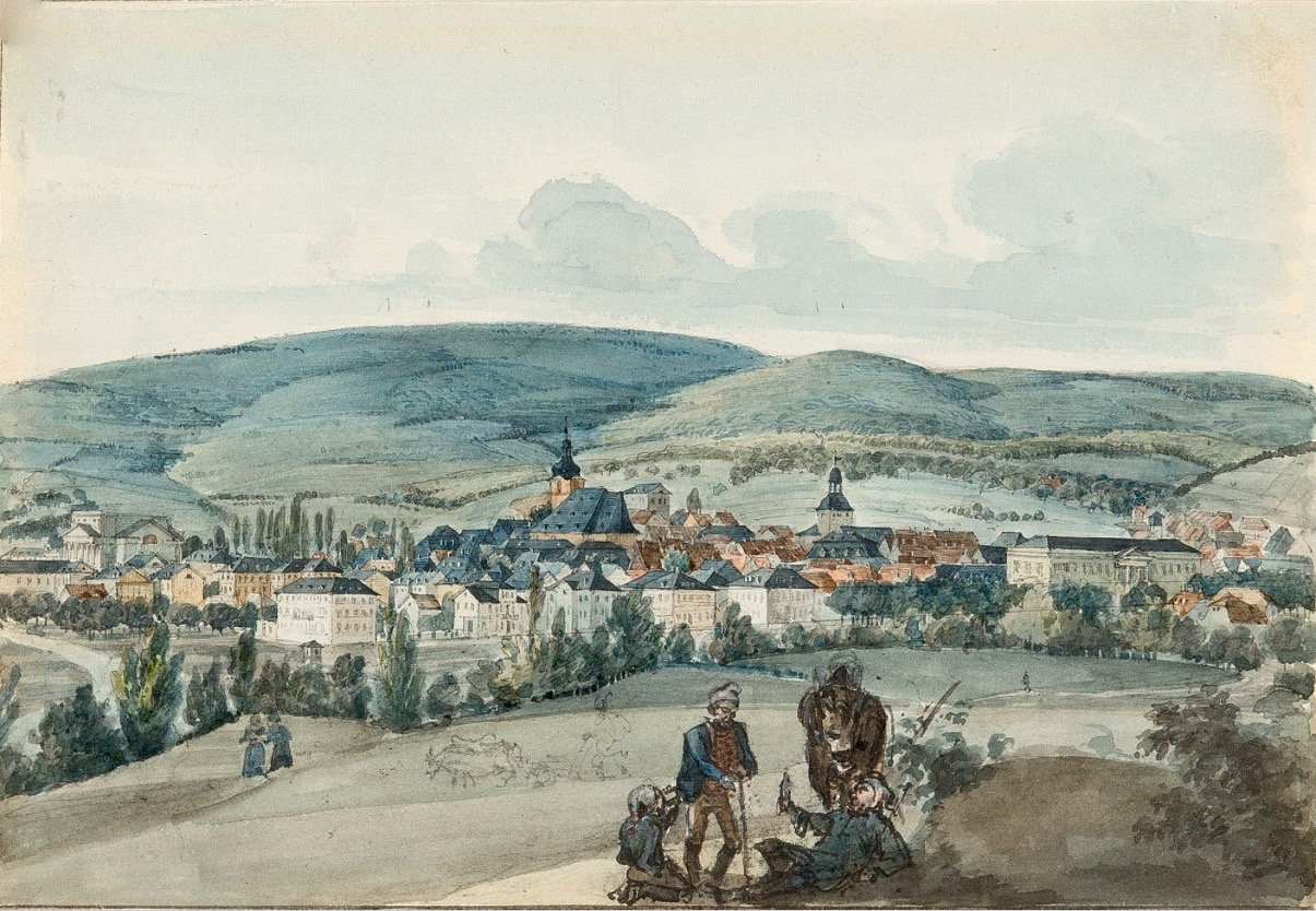 Fritz Bamberger: Blick auf Wiesbaden von Südosten, 1837, Aquarell über Bleistift auf Velin, 11 x 16 cm, Privatsammlung Wiesbaden.